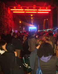 Partygäste der Gleimtunnel-Party in 2007 mit Lichtinstallation